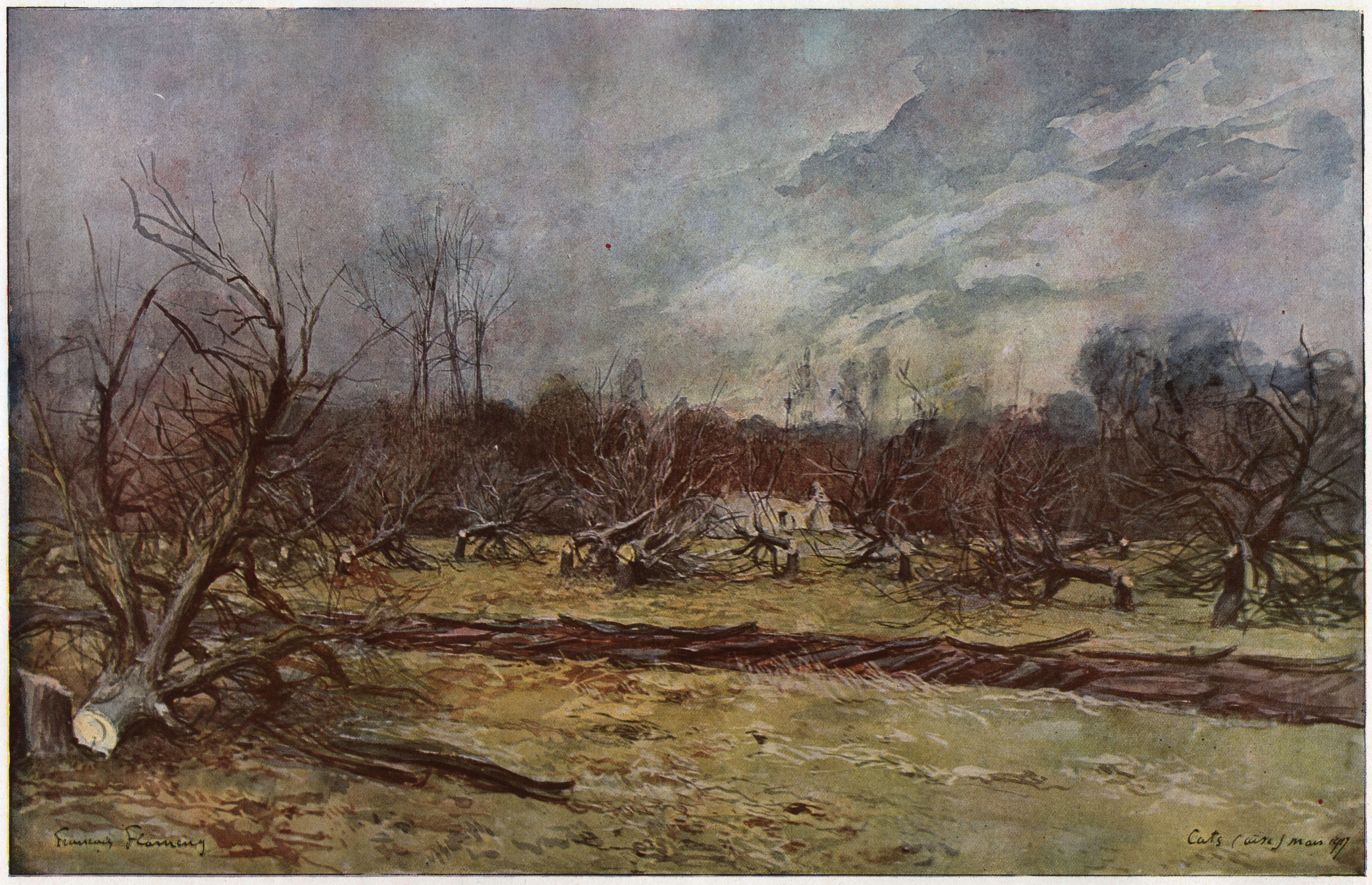 Scan of L'ILLUSTRATION No 3905 5 Janvier 1918. Les pommiers coupés à Cuts (Oise).